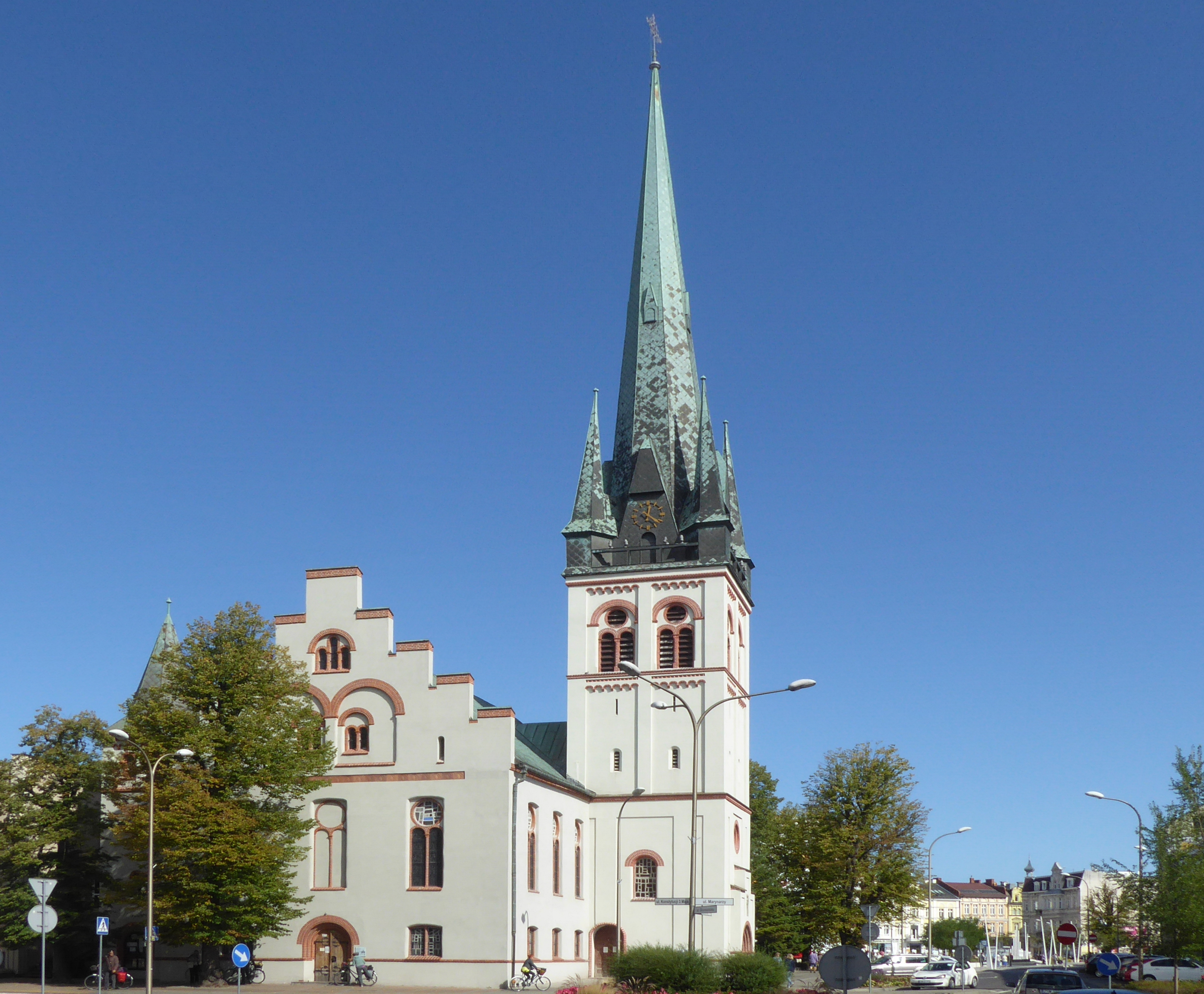 Kosciól Rzymskokatolicki pw. Chrystusa Króla Swinoujscie - Christuskirche Swienemünde Polen Foto Wolfgang Pehlemann P1250670